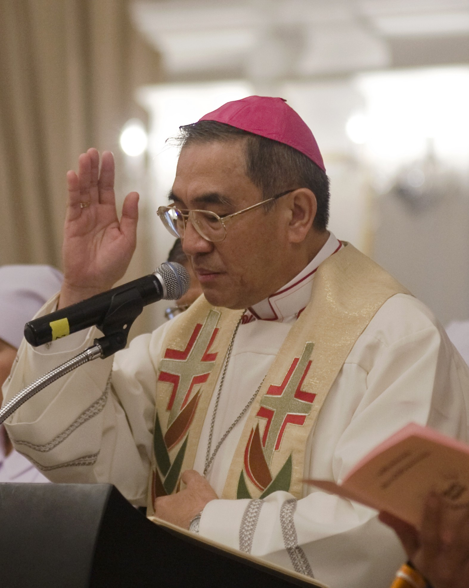 Archbishop Francis Xavier Kriengsak Kovitvanit นายกรัฐมนตรีเป็นประธานประกอบพิธีทางศาสนา 5 ศาสนา ประกอบด้วย พุทธ อิสลาม คริสต์ ฮินดู ซิกข์ เพื่อความเป็นสิริมงคลแก่ประเทศไทย ณ ตึกสันติไมตรีหลังนอก ทำเนียบรัฐบาล วันที่ 10 มิถุนายน 2553 (The Official Site of The Prime Minister of Thailand Photo by พีรพัฒน์ วิมลรังครัตน์)